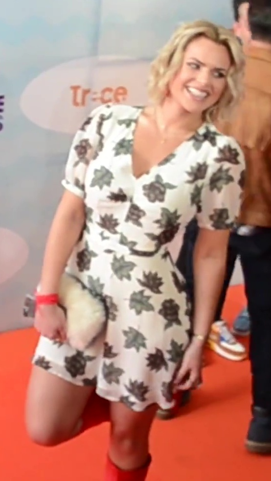 Isabella Castillo en la alfombra naranja de los Kids' Choice Awards Colombia 2017